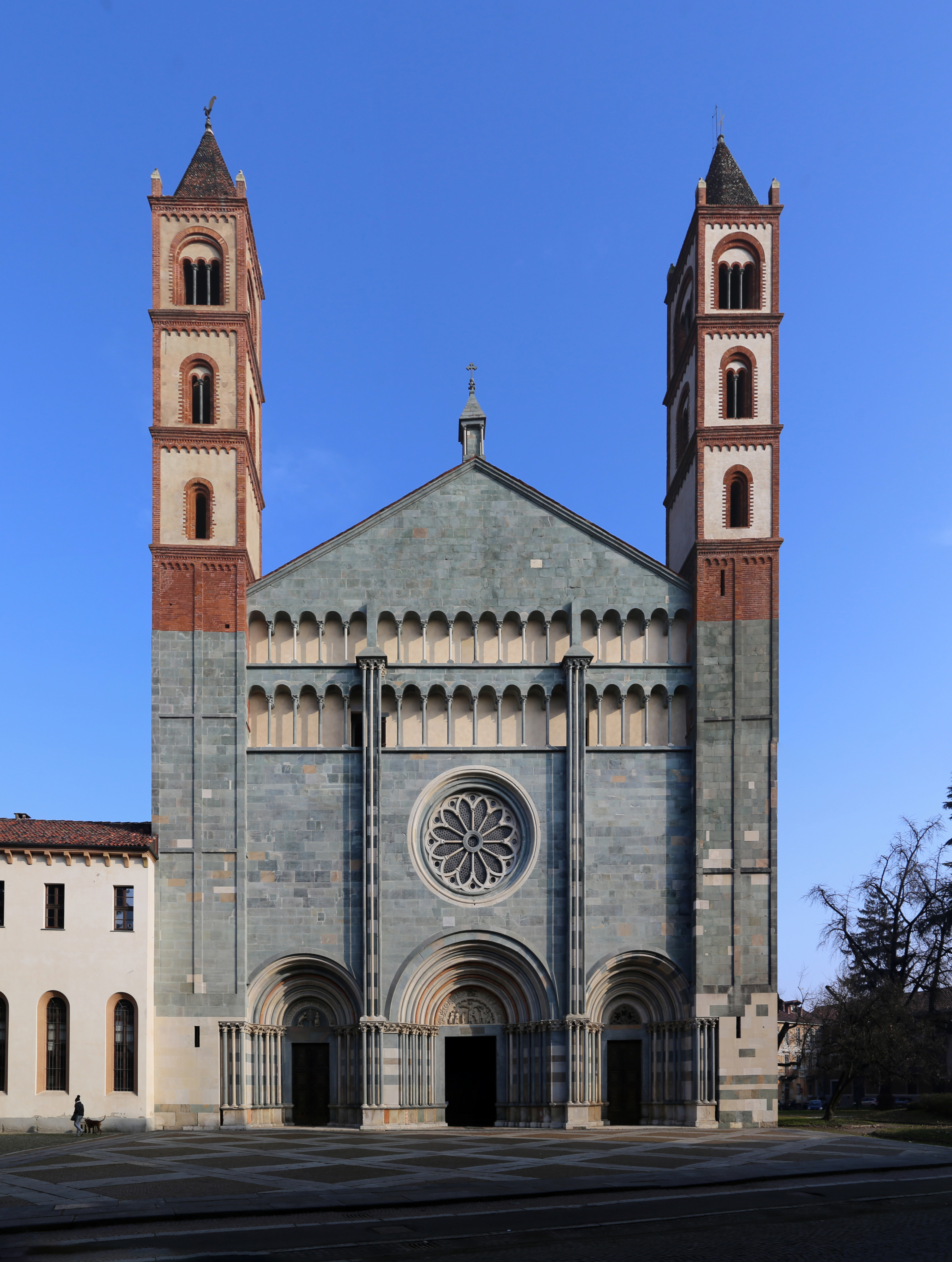 basilica di Sant'Andrea This is a photo of a monument which is part of cultural heritage of Italy.